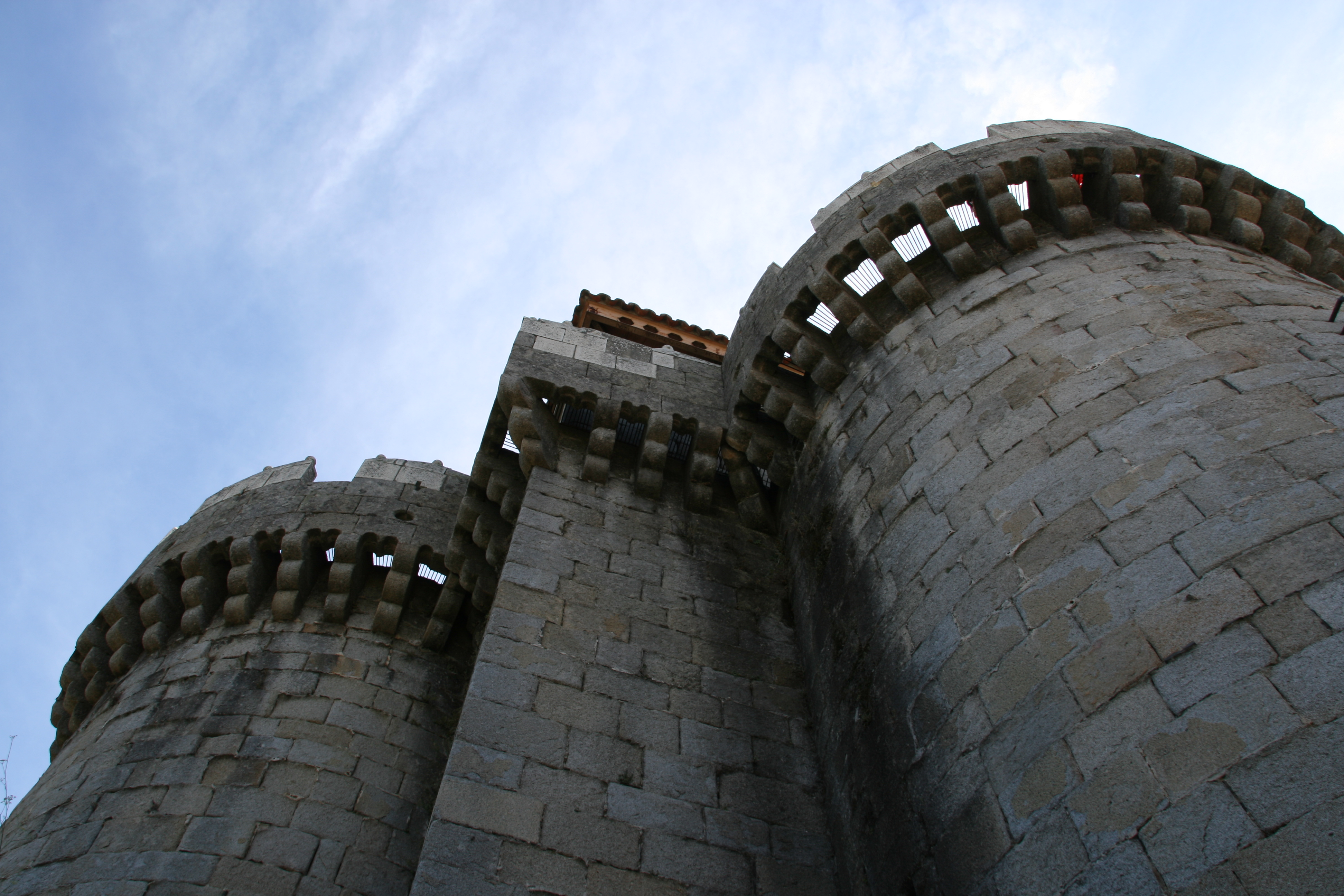 Castillo de Granadilla (Cáceres)